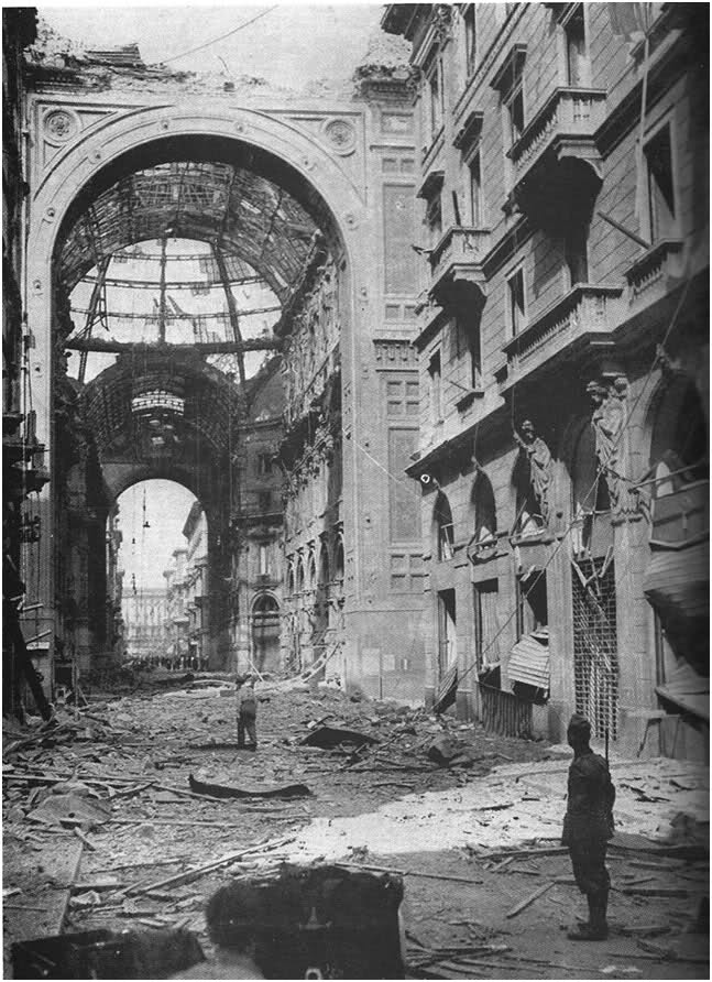 Milano, la Galleria nell'agosto del 1943, dopo i bombardamenti